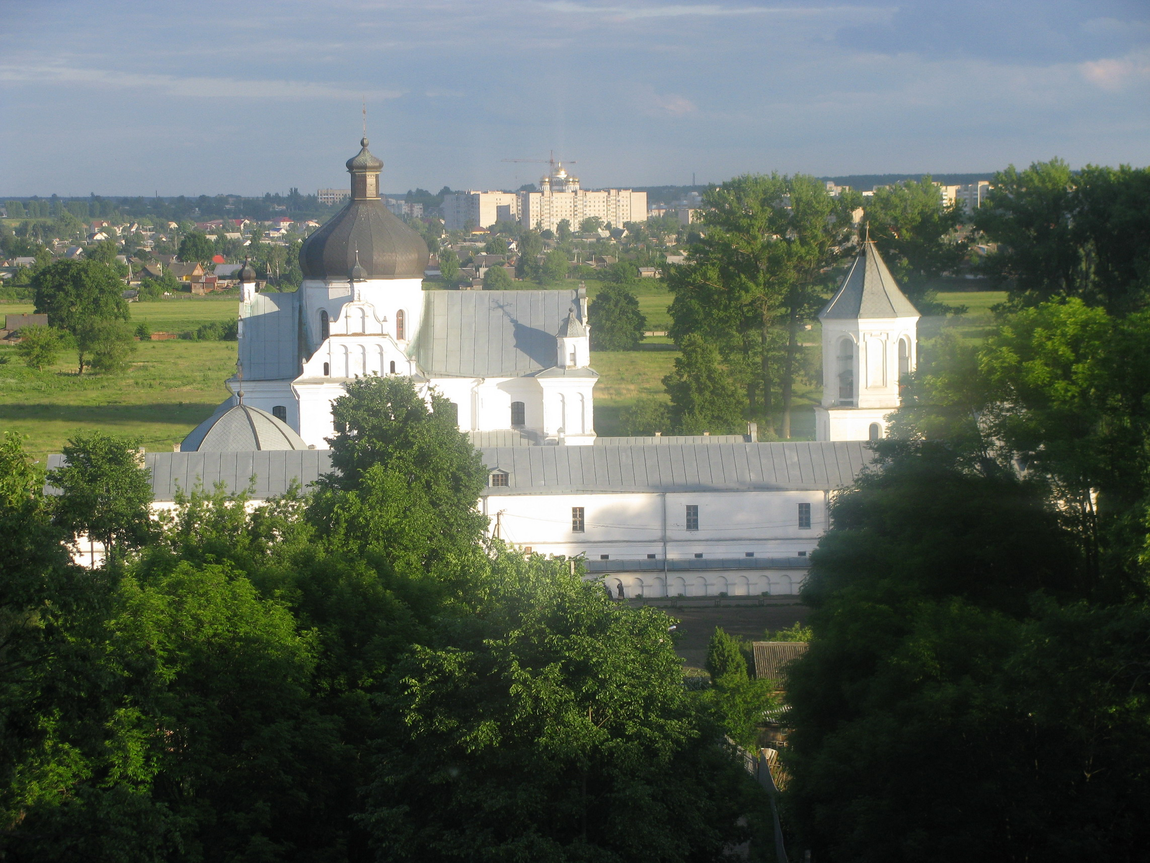 Свято-Никольский монастырь в городе Могилёве (Республика Беларусь). Вид с улицы Боткина.